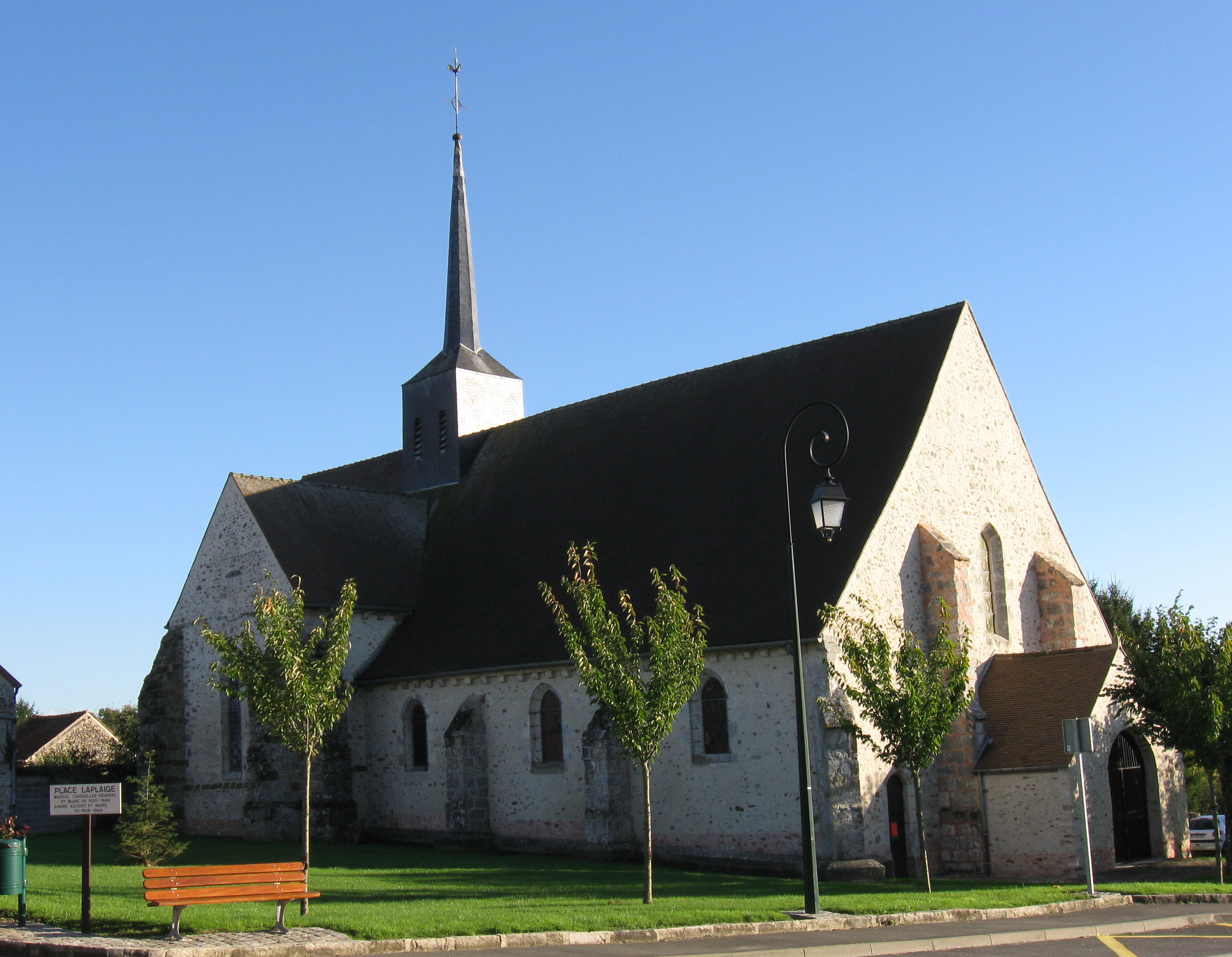 Église Saint-Martin de Saint-Martin-des-Champs (département de la Seine-et-Marne, région Île-de-France).